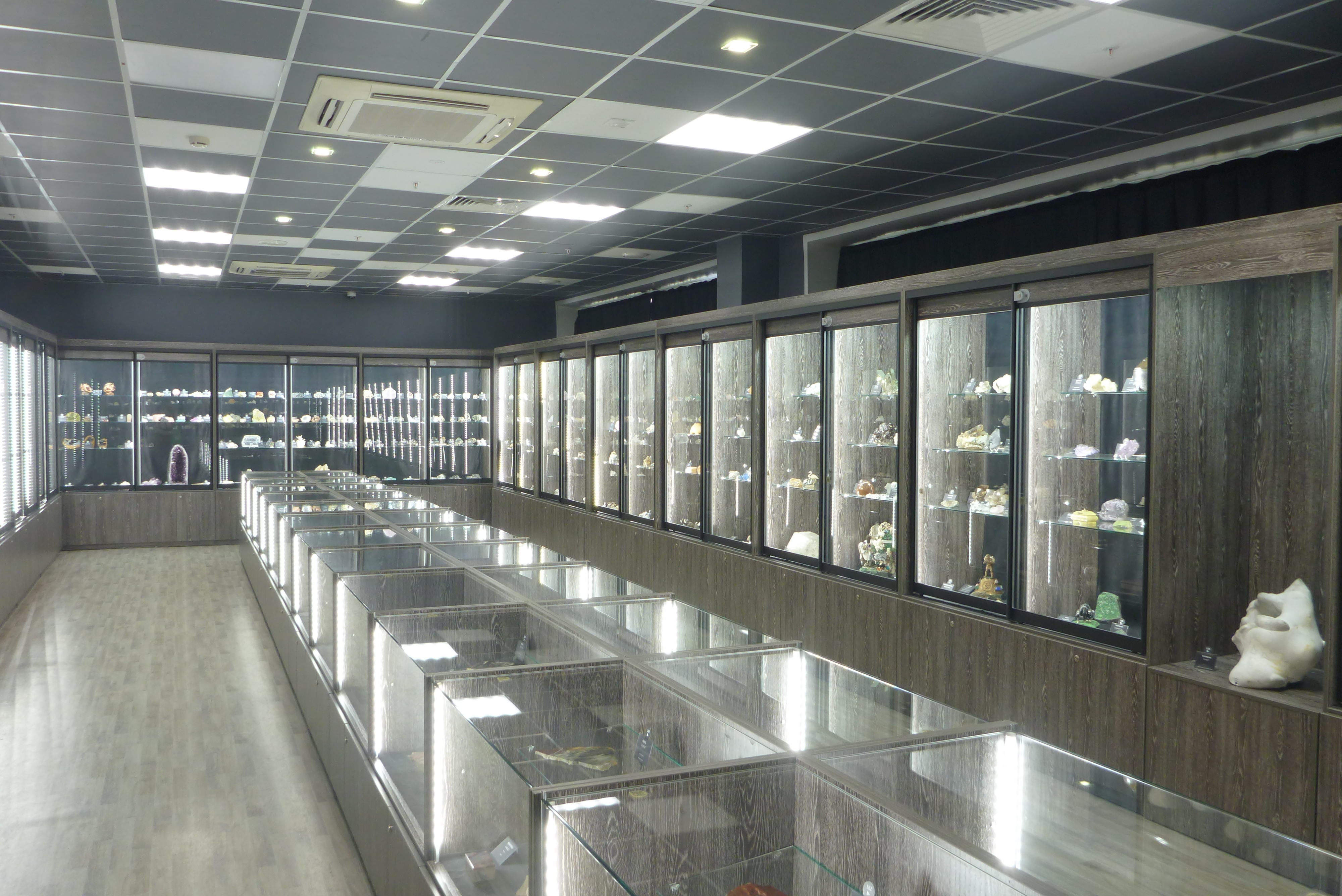 Уральский минералогический музей В А Пелепенко в Первоуральске экспозиция 7 июня 2019 года